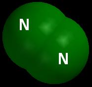 mitrogen drawing